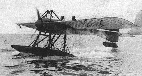 Hidroavión Depmonaco